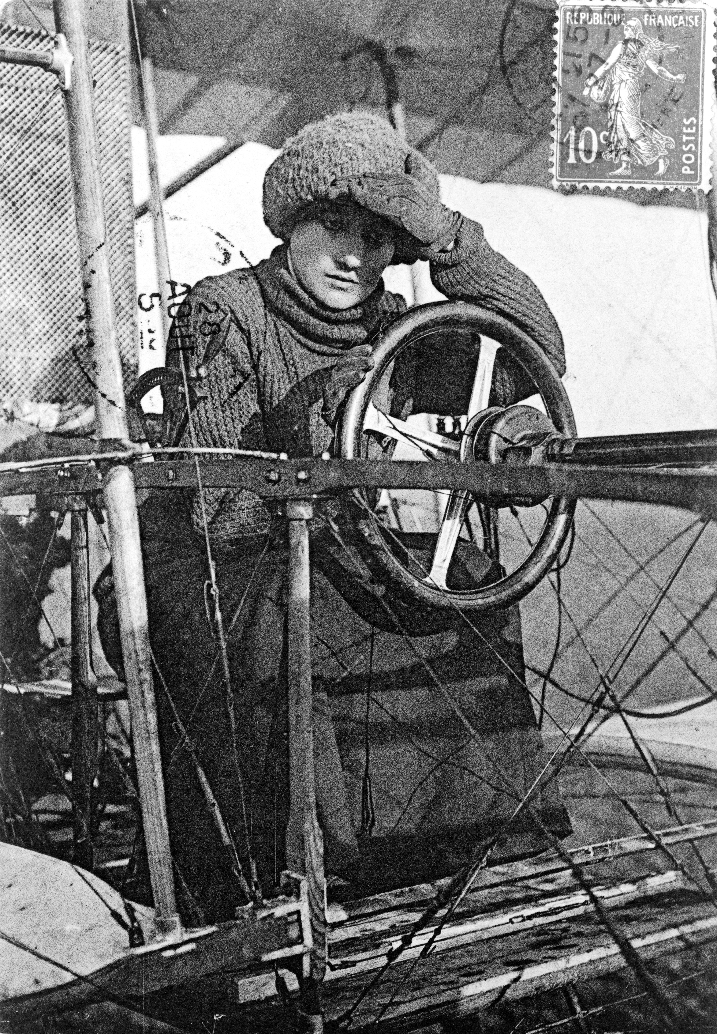 Les Maitres de l'aviation. Mme. la Baronne de Laroche, aviatrice, au poste de direction d'un biplan Voisin / ND phot. Élise Deroche (variously known as "Raymonde, baronne de Laroche" or "de la Roche") at the controls of her Voisin biplane. Postcard has French postage stamp on image side.